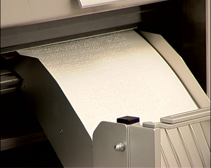 צילם: אבי ידלין